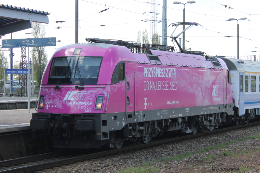 Elektrowóz EU44-010 Husarz w okleinie T-Mobile wjeżdża na stację kolejową Warszawa Zachodnia.